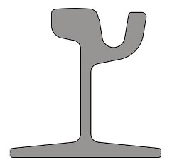 Secció del carril que va soterrat per ús urbans